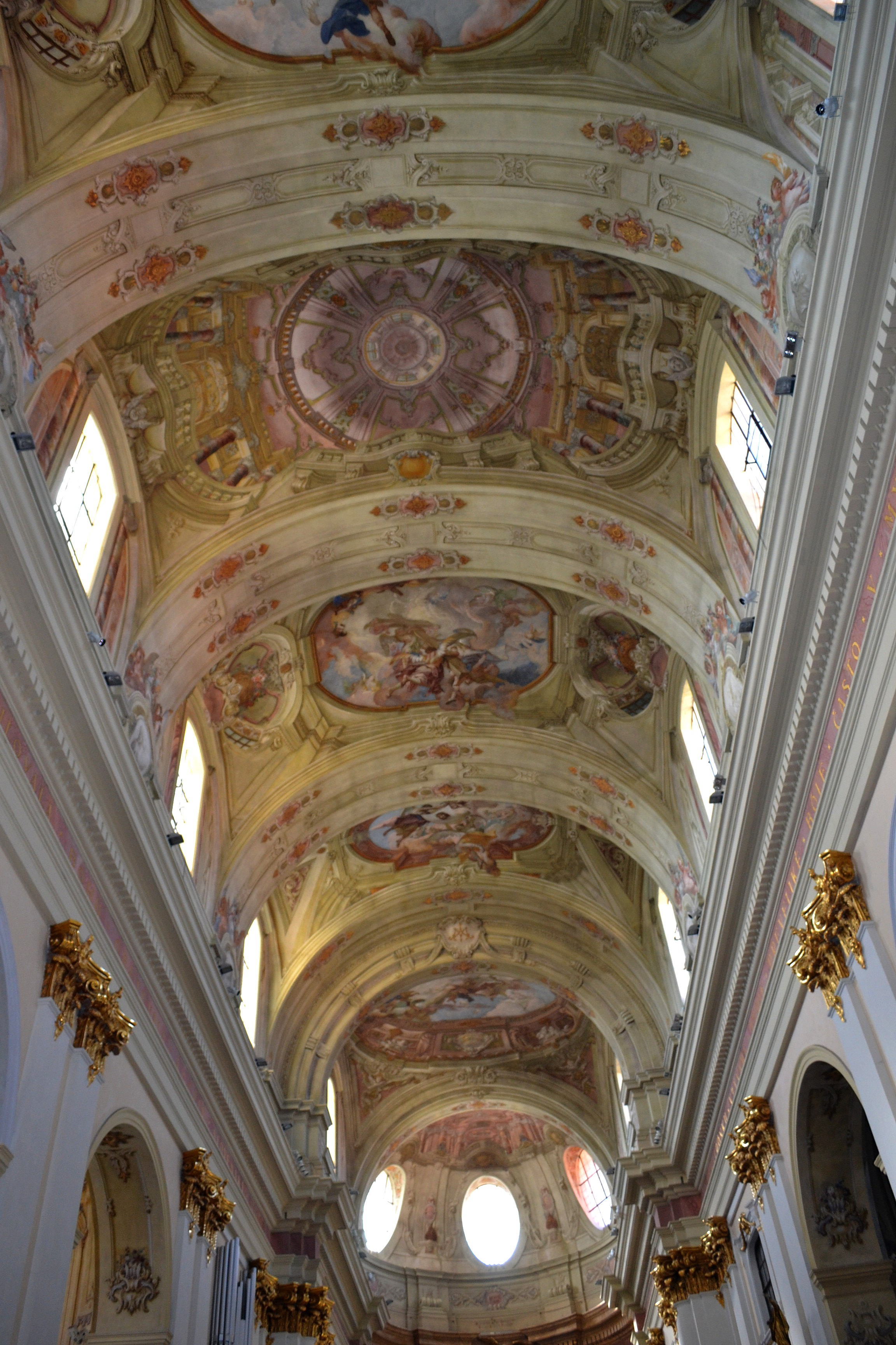 Šaštín-Stráže (okr. Senica), Bazilika Sedembolestnej Panny Márie; fresková výmaľba stropu